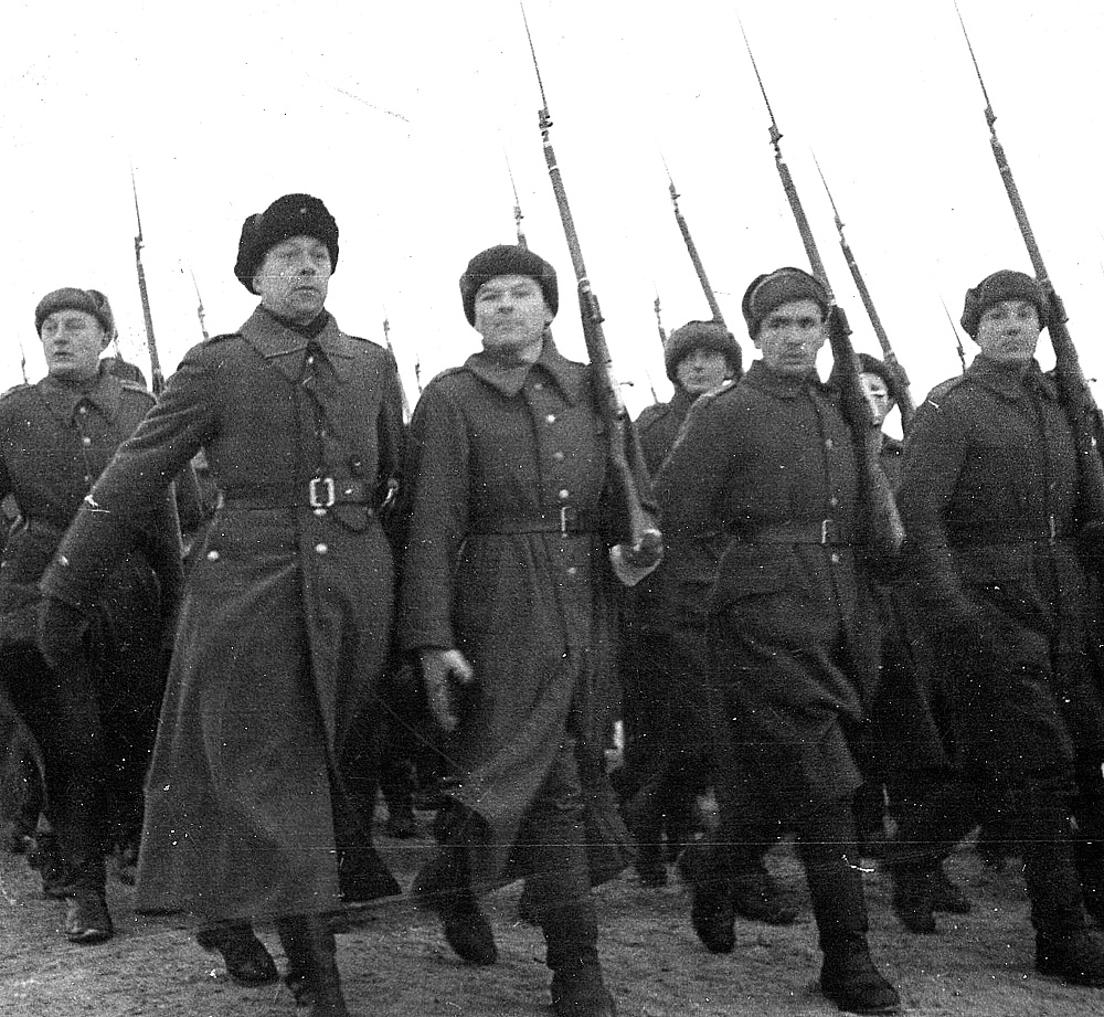 Polish soldiers before general Sikorski in Russia